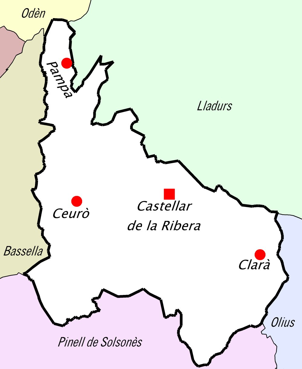 Mapa del municipi de Castellar de la Ribera (Solsonès) amb les seves 4 entitats de població i els municipis limítrofes.